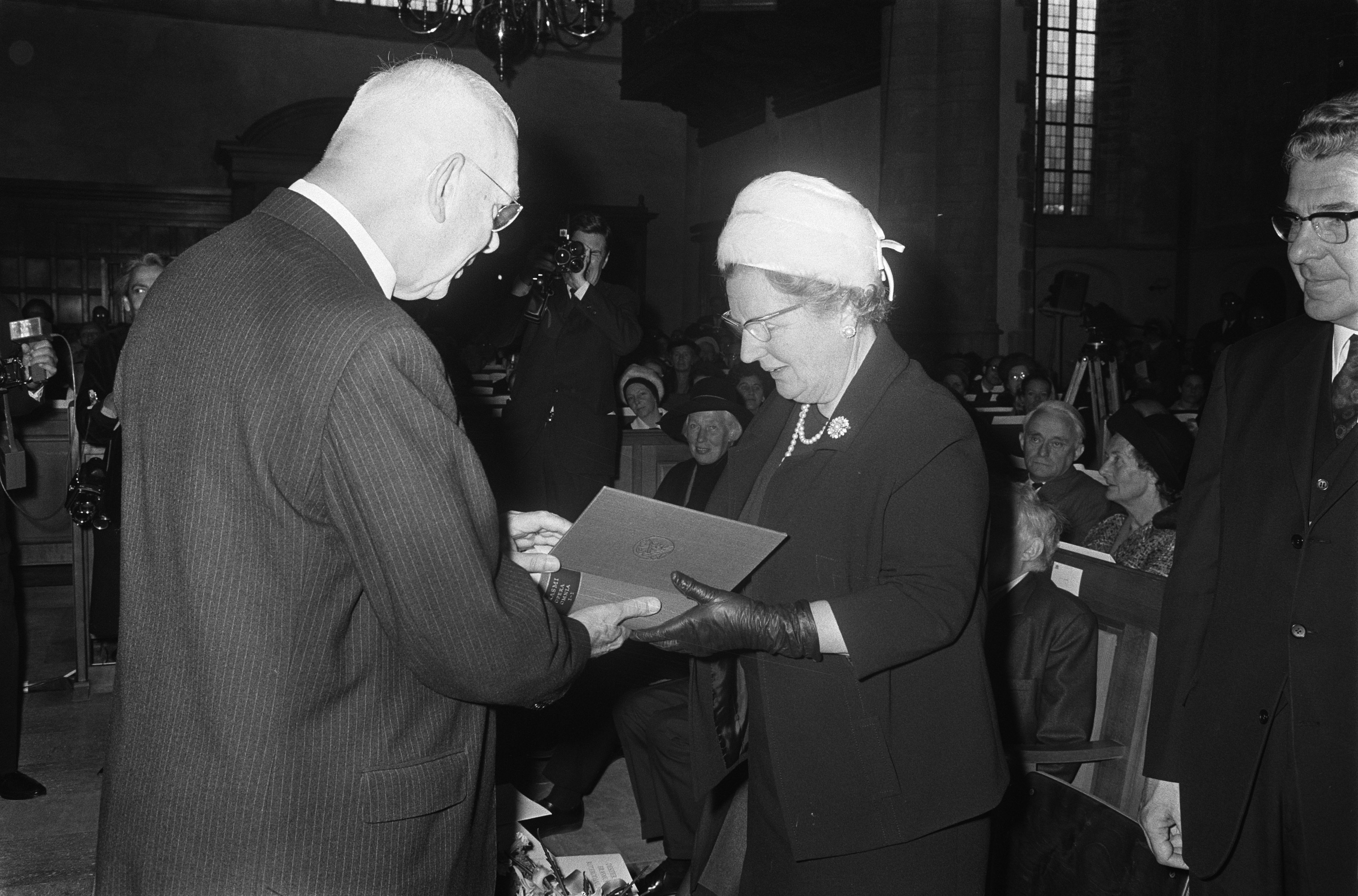 Professor dr. J.N. Bakhuizen van den Brink biedt koningin Juliana het eerste deel van de Opera omnia van Erasmus aan. Rotterdam, 27 oktober 1969